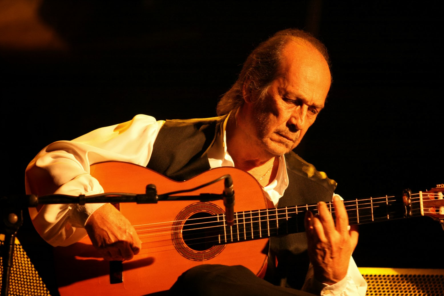 Başlıq